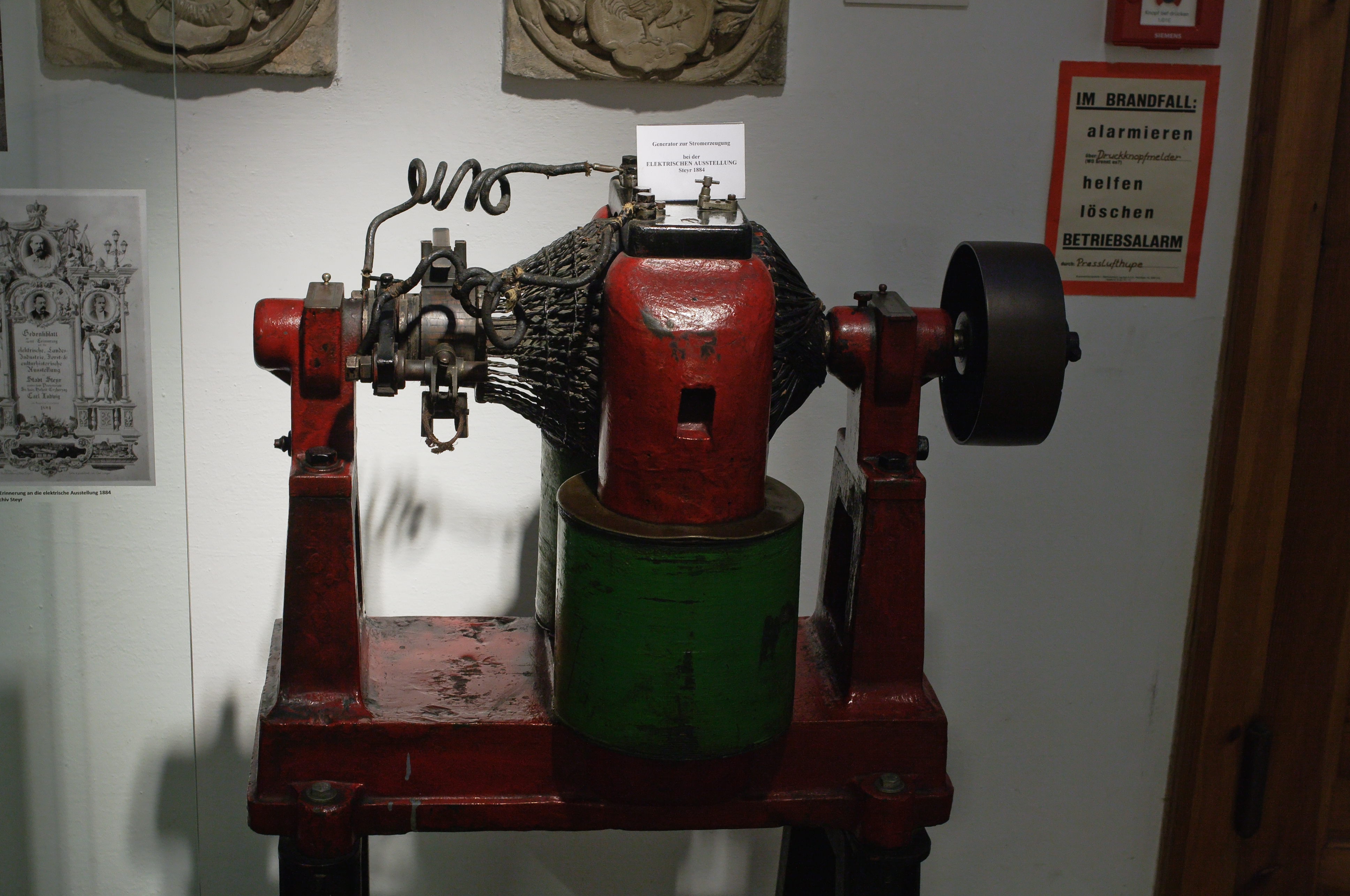 Werndl-Generator im Museum der Stadt Steyr, Innerberger Stadel, Erdgeschoss